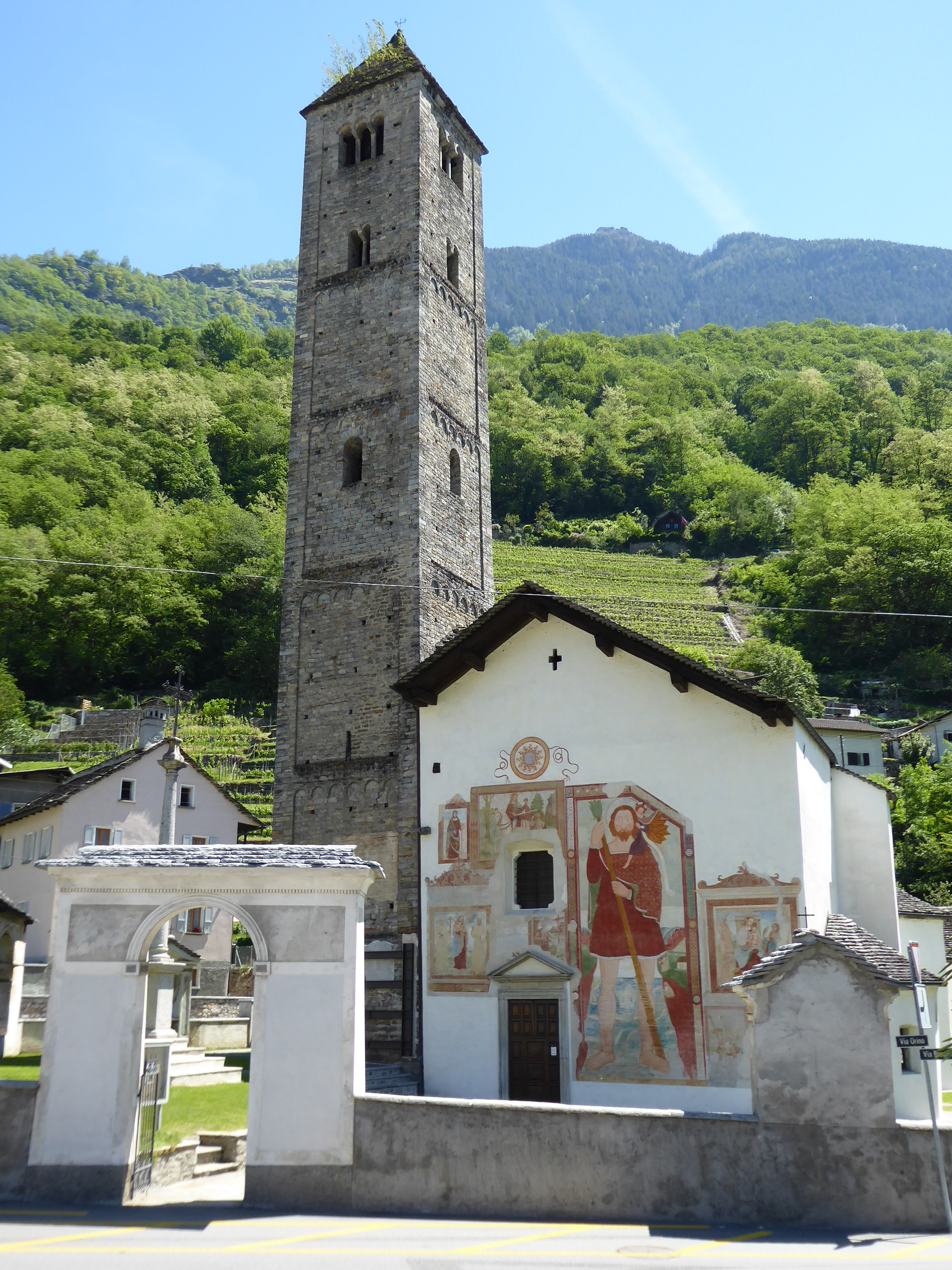 Die Pfarrkirche San Martino di Tours in Malvaglia, Tessin.